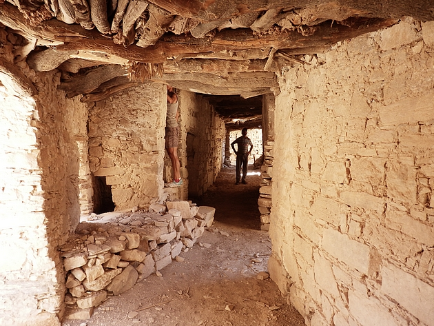 überdachter Gang im Dorf